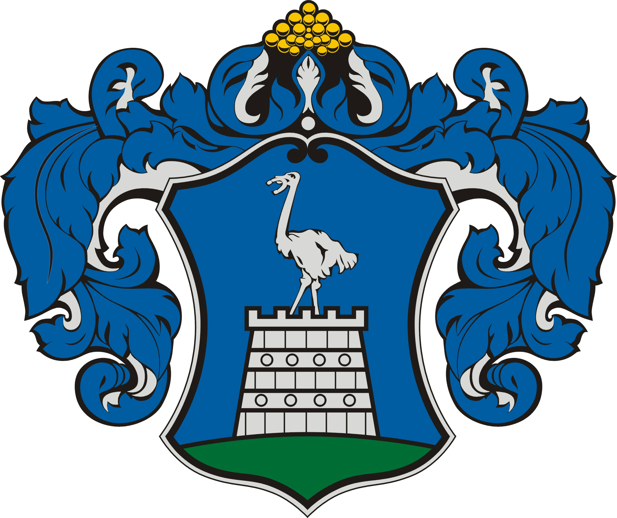 Coats of arm of countie of Hungary